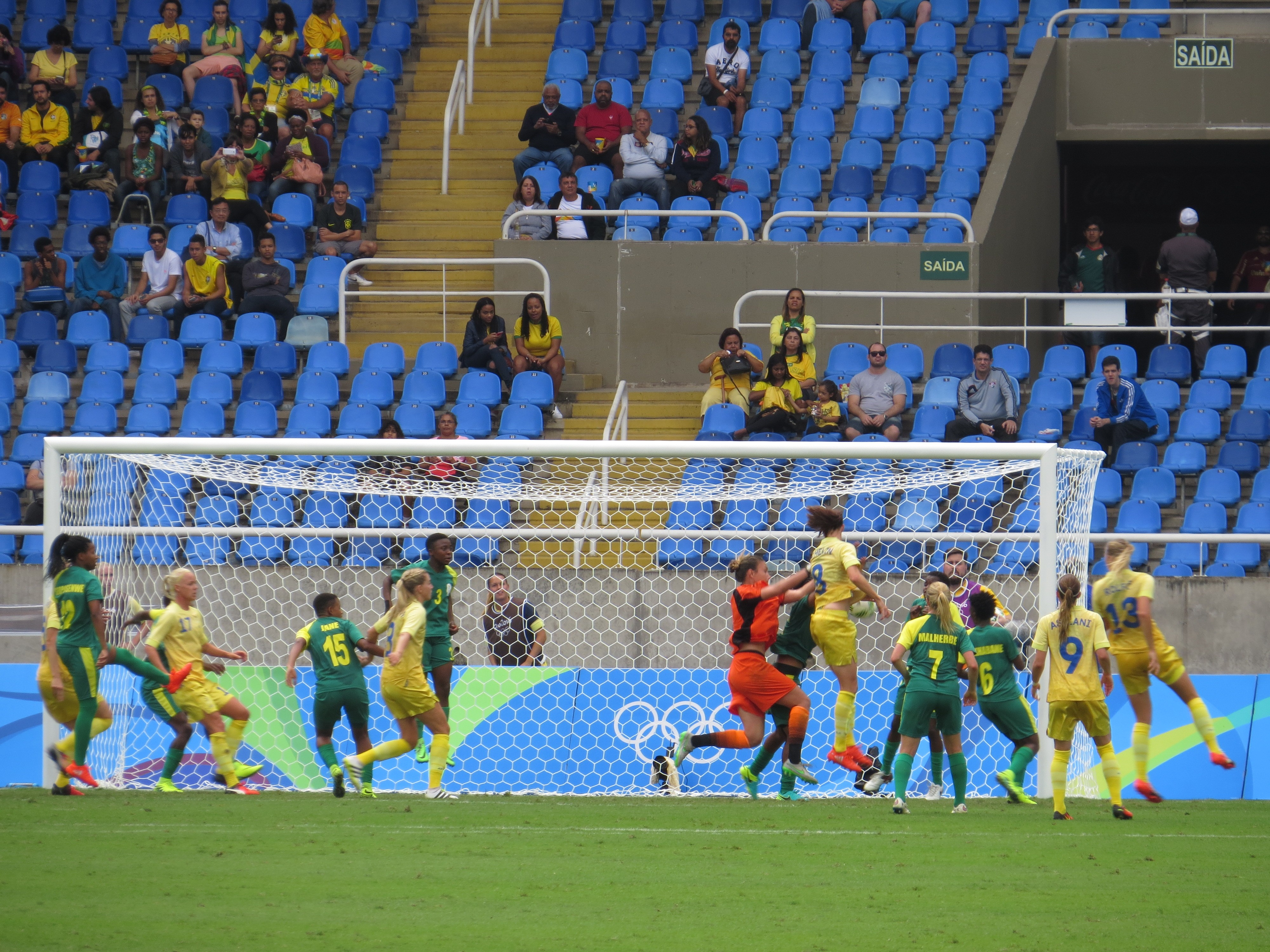 Futebol feminino Suécia 1 x0 Africa do Sul 03/08/16